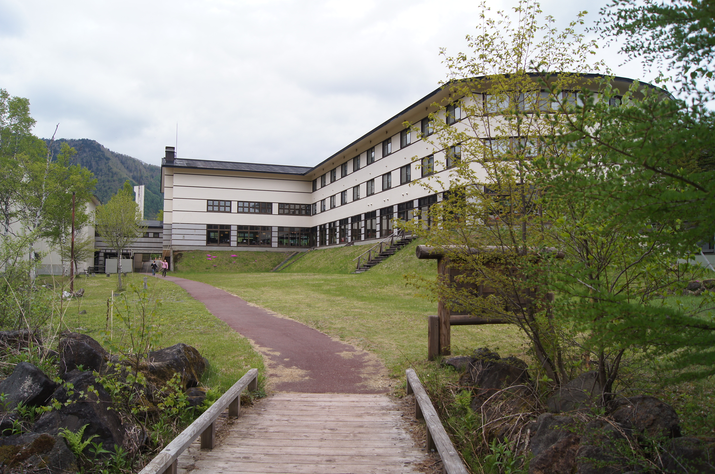 長野県松本市安曇の乗鞍高原にある「休暇村乗鞍」の本館裏側